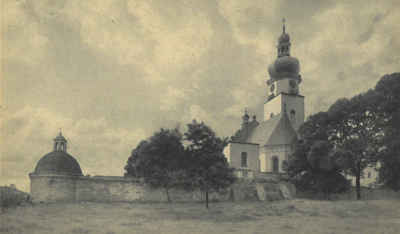 Kościół Matki Bożej Pocieszenia (Maryi Dziewicy) w Sokalu, Austro-Węgry (później Polska, obecnie Ukraina), koniec XIX wieku.